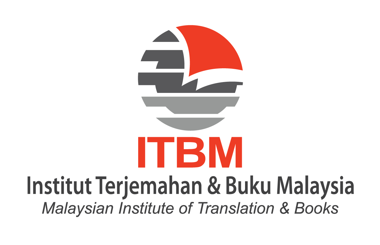 ITBM official logo.